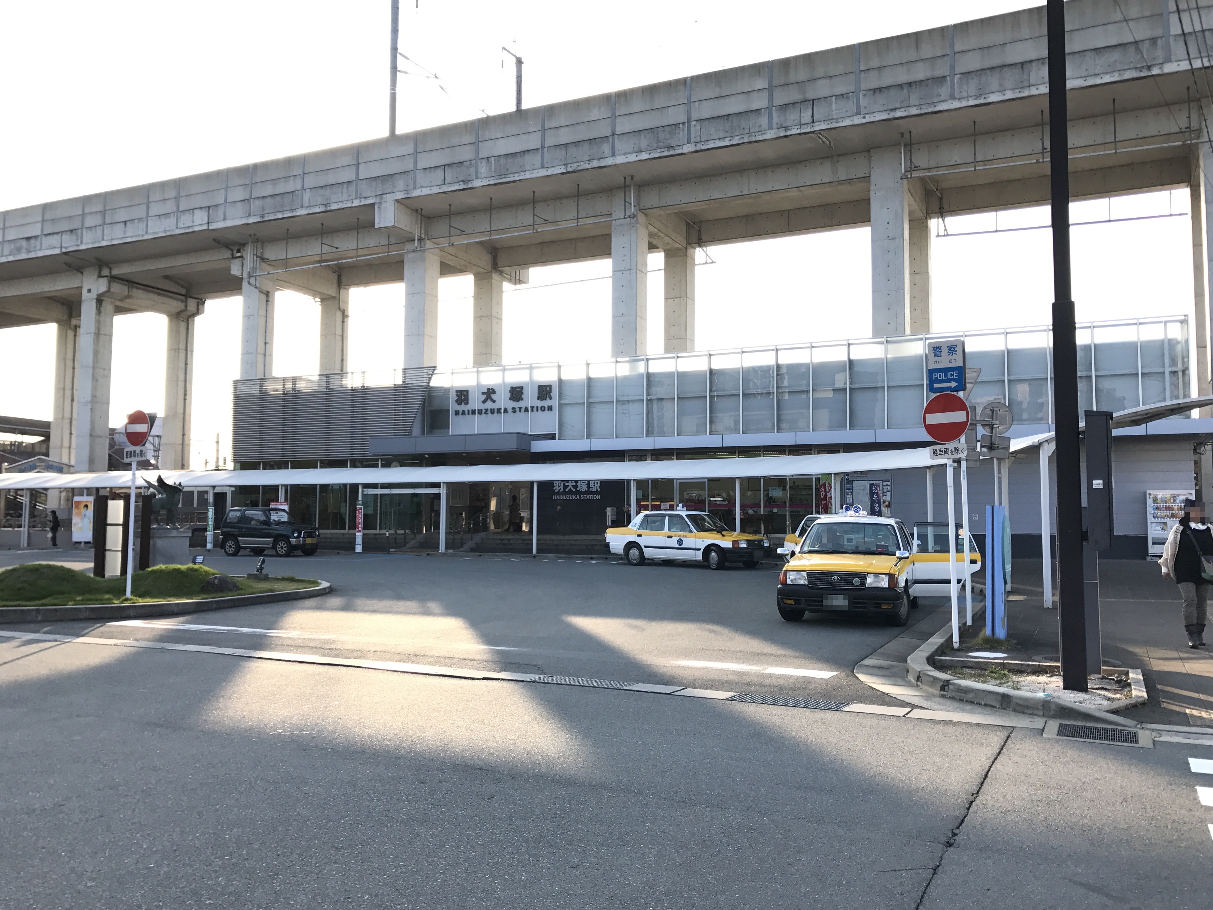 羽犬塚駅駅舎